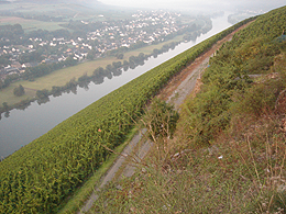 Brauneberg